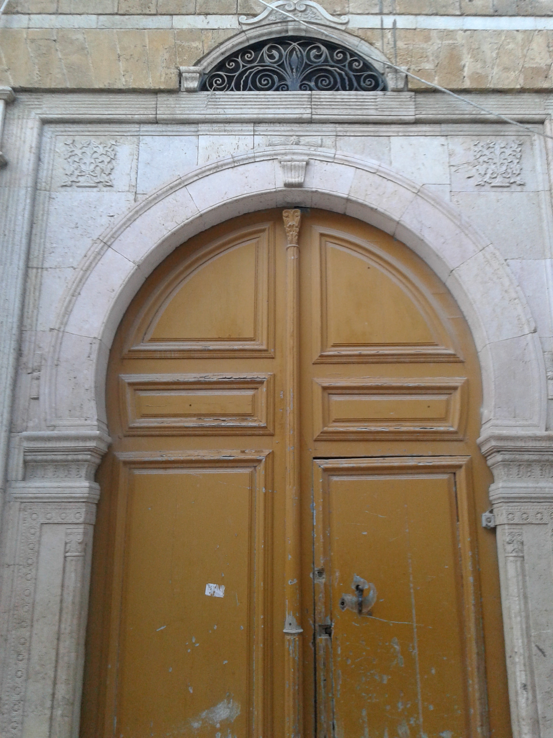 Portail du dar Jaiyet